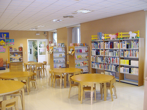 Vista de la sala de la Bebeteca en la Biblioteca Provincial de la Diputación de A Coruña